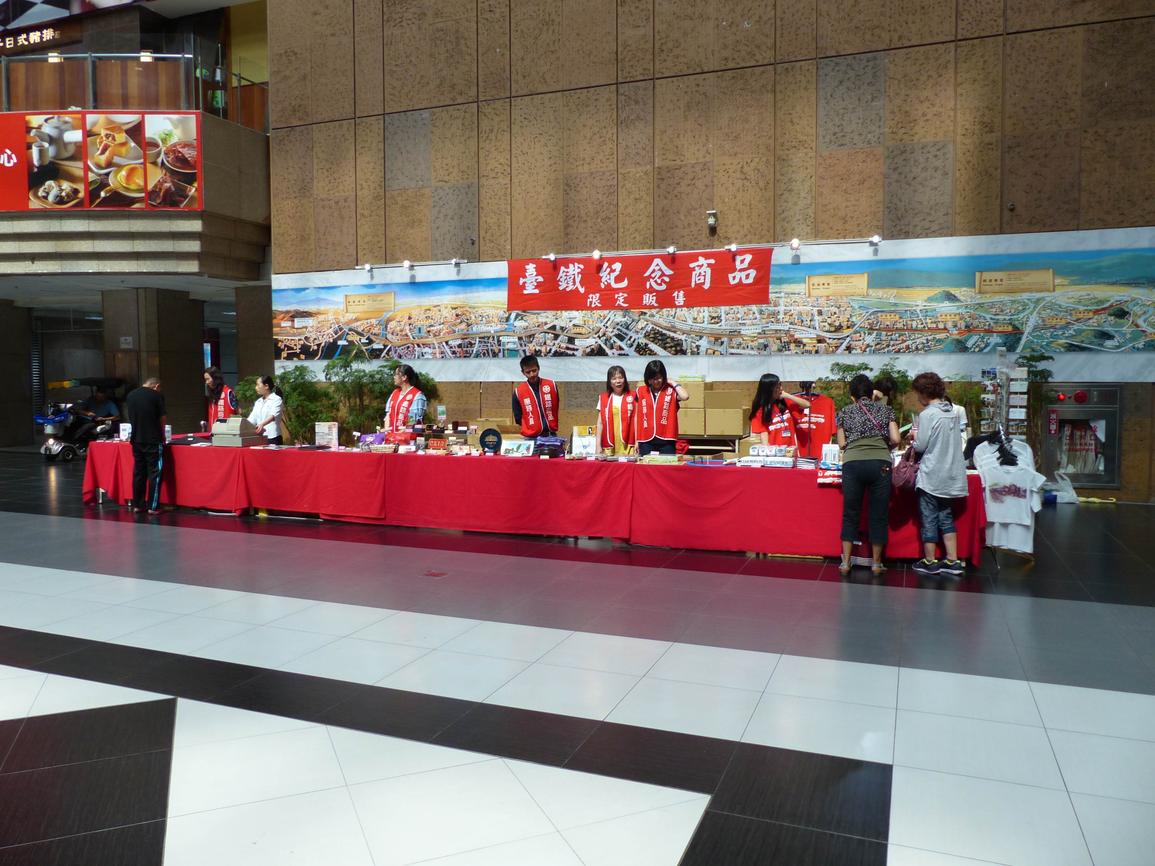 2015年鐵路節，臺北車站大廳東南角的臺鐵128周年紀念限定商品攤位。